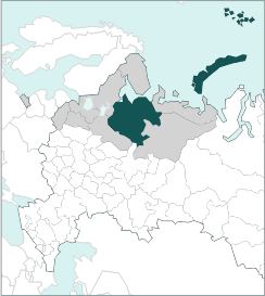 Arhangelski oblasti asend (ilma Neenetsimaata) Loode föderaalringkonnas